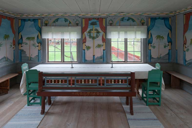 Stene 3:19. Interiör. Gammelbyggningen. Nybyggnadsår 1807. Hälsingegårdar. Motiv: Stene 3:19 Nyckelord: Byggnadsminnen, Riksintressen, Världsarv Kategori: Jordbruksegnahem Stene 3:19. Interiör. Gammelbyggningen. Nybyggnadsår 1807. Hälsingegårdar. Stene 3:19.